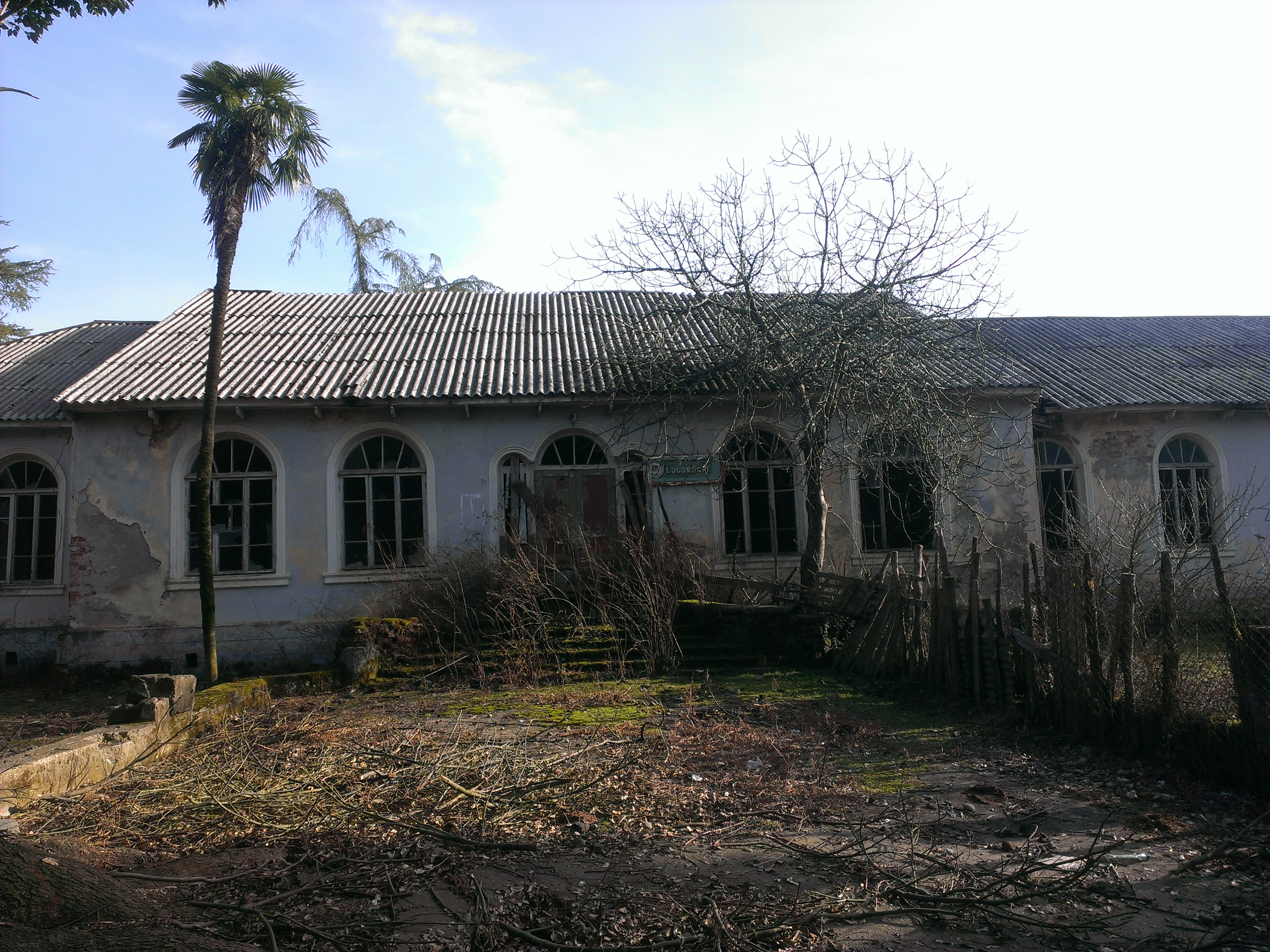 laituri sasadilo